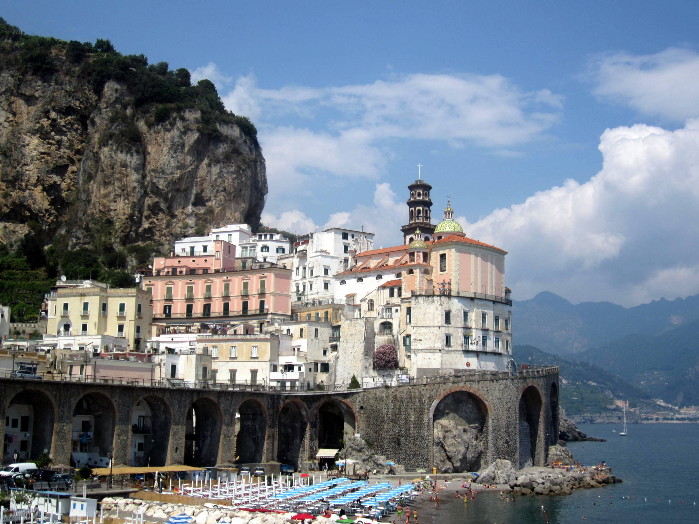 Veduta di Atrani in provincia di Salerno